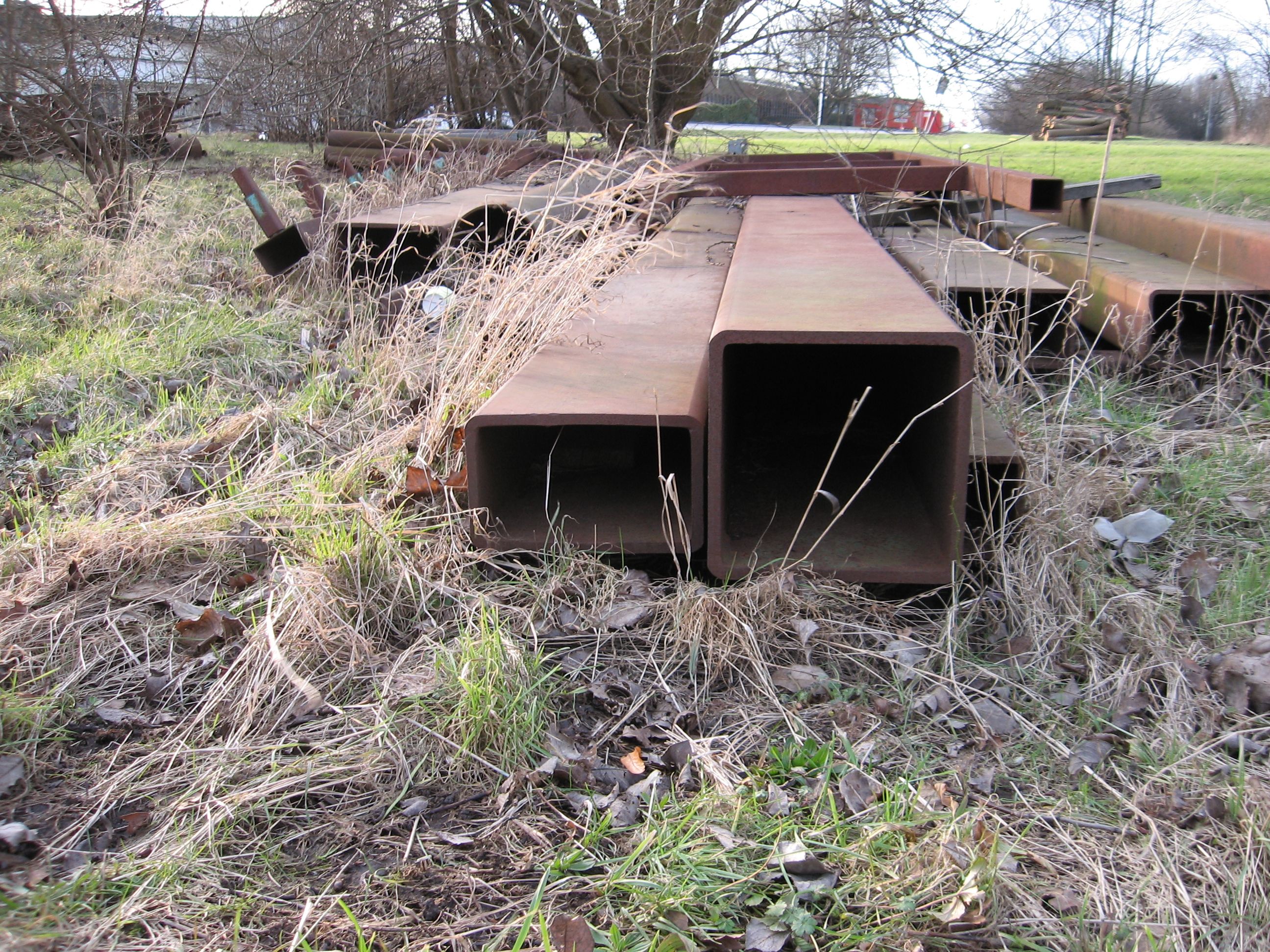 VKR-rör